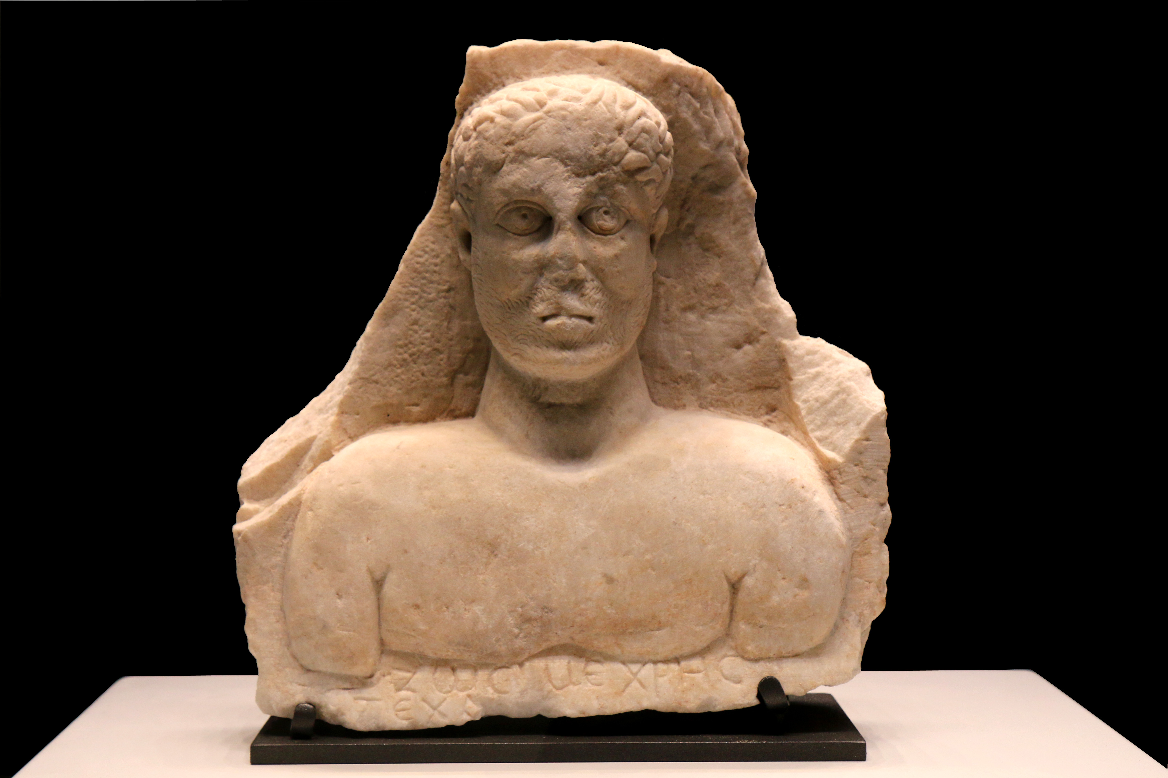 Stèle à fronton, buste en marbre avec inscription en grec, Zosimos. III° siècle après J.-C.